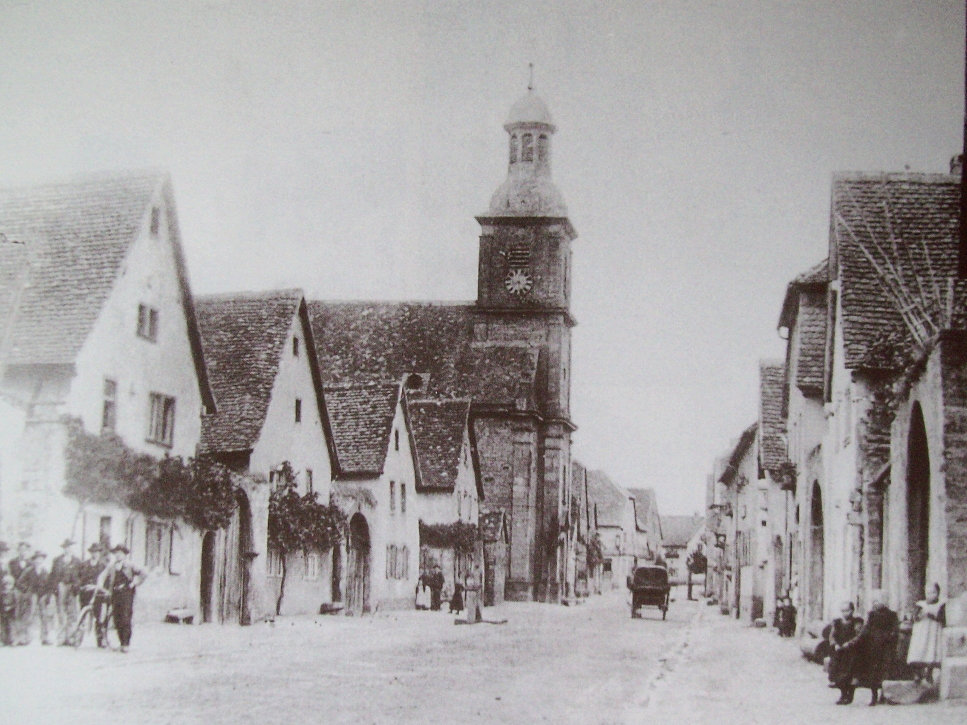 Dorfansicht Obernau um 1900 (Kirche mit Hauptstrasse)